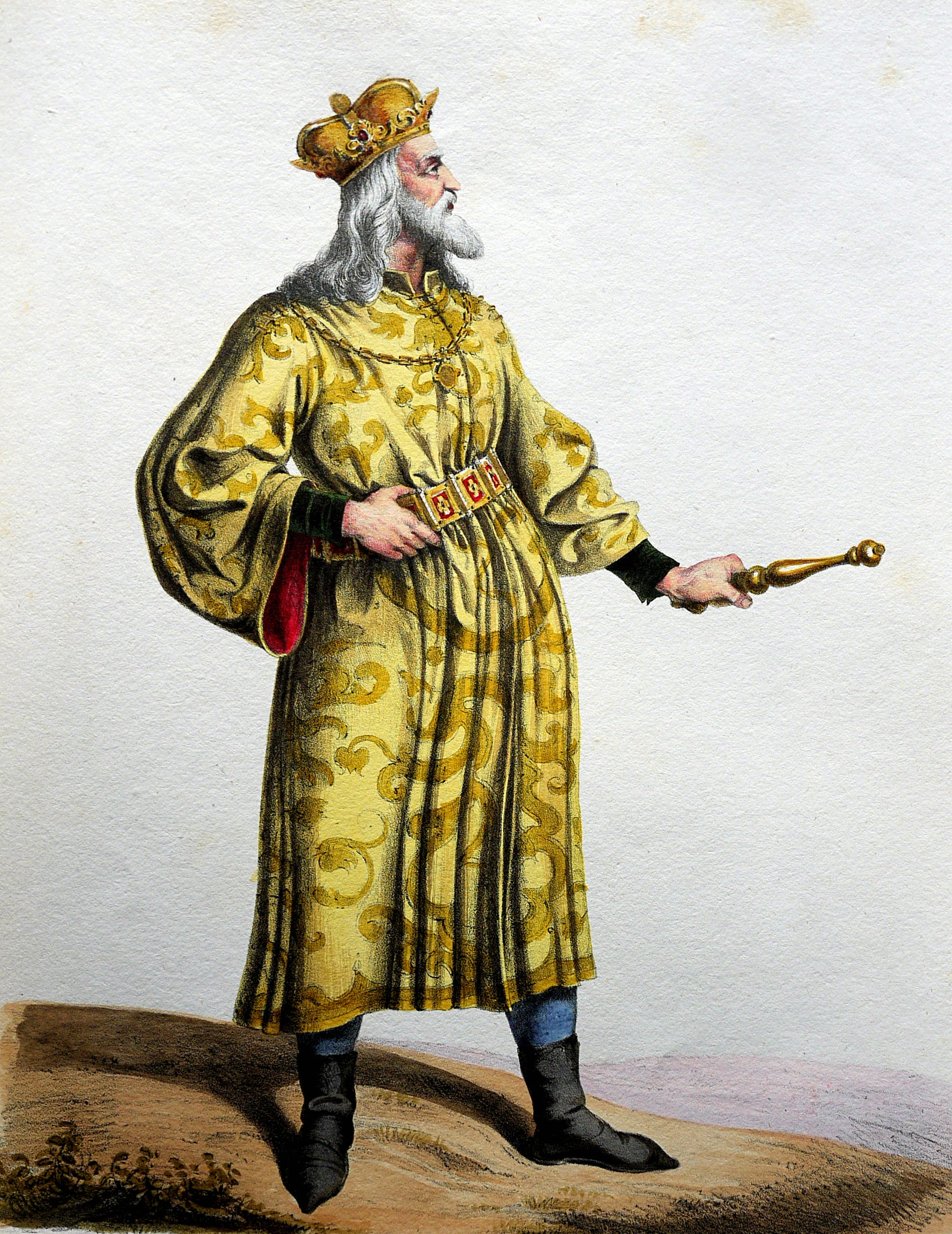 Béla IV. (1206-1270), König von Ungarn etc.; Lithographie von Josef Kriehuber nach einer Zeichnung von Moritz von Schwind aus Ungerns Erste Heerführer Herzoge und Koenige In einer Reihe von Bildnissen von Bela bis auf Seine Majestät Franz I. Kaiser Von Österreich König Von Ungern &c., &c. Wien : Lithographisches Institut ;ca. 1828